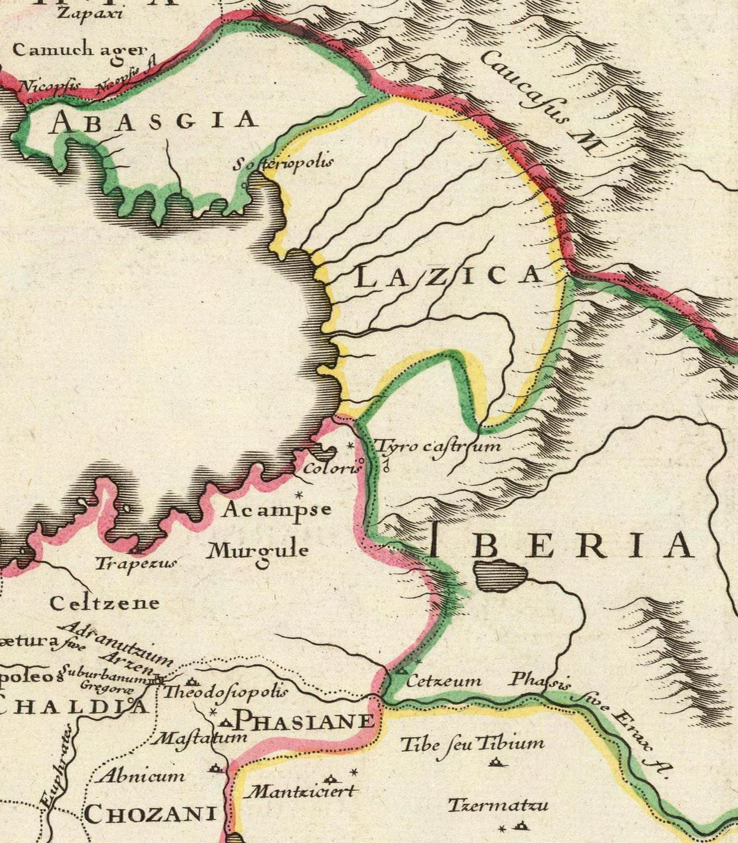 Imperii Orientalis et Circumjacentium Regionum, sub Constantino Porphyrogenito et ejus praedecessoribus descriptio. Auctore Guillelmo Del'Isle e Regia Scientiarum Academia, ad novam editionem Libri Constantini Porphyrogeniti de Administrando Imperio quae prodit studio Anselmi Bandurii, Monachi Benedictini Ragusini Melitensis cum ejus dem note et animadversionibus. (Paris : Guillelmo Del'Isle, 1715?).